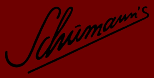 Logo von Karl Georg Schuhmanns Bar Schumann's in München